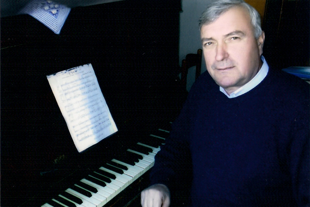 Fotografi e Zef Çoba prane pianos.